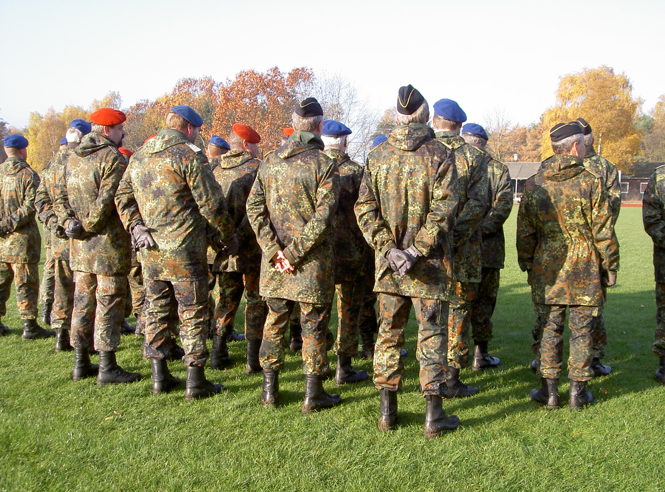 Offiziere in Flecktarn